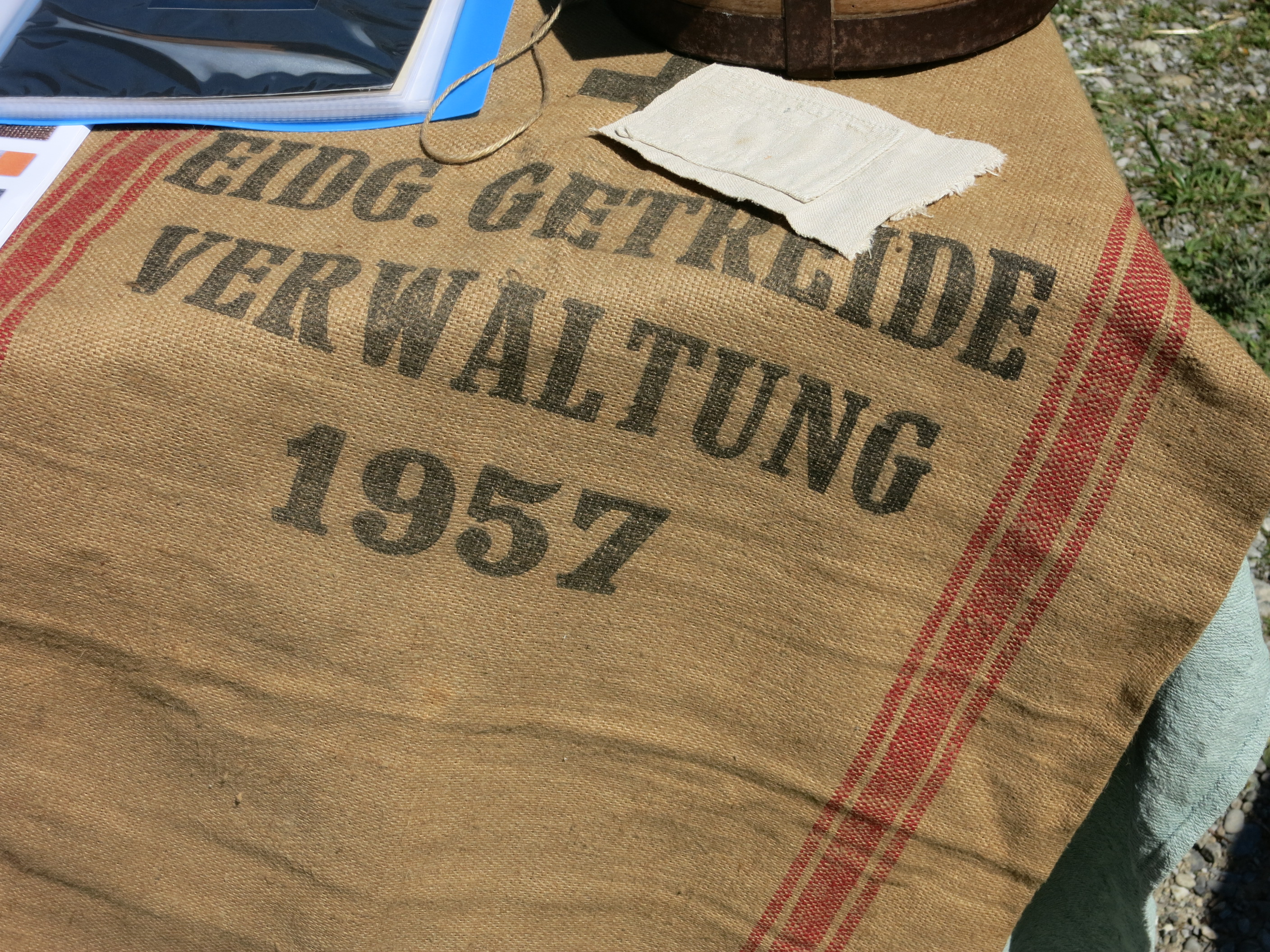 Aumüli, Stallikon ZH, Schweiz